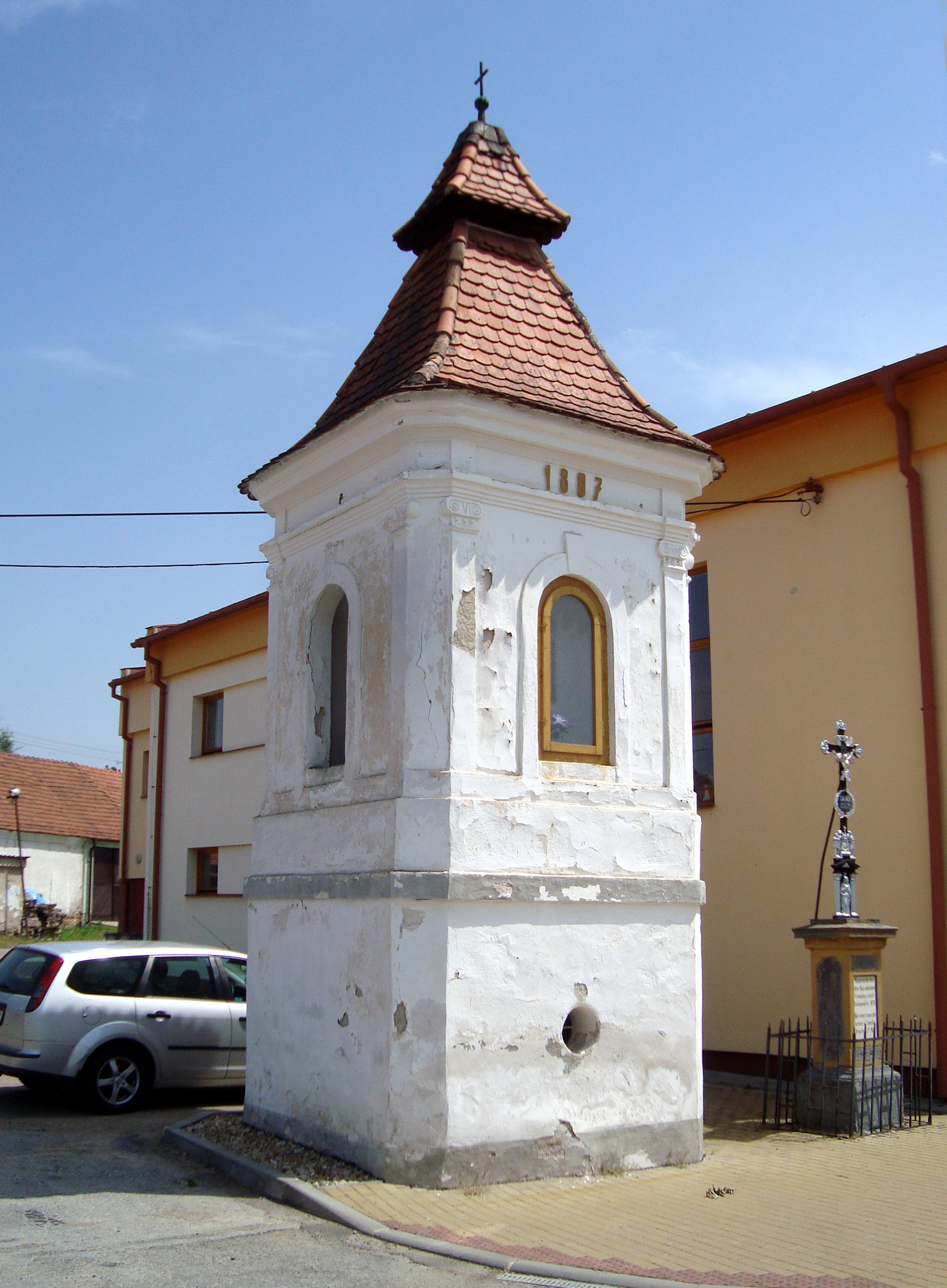 Senorady, Česká republika, okres Třebíč